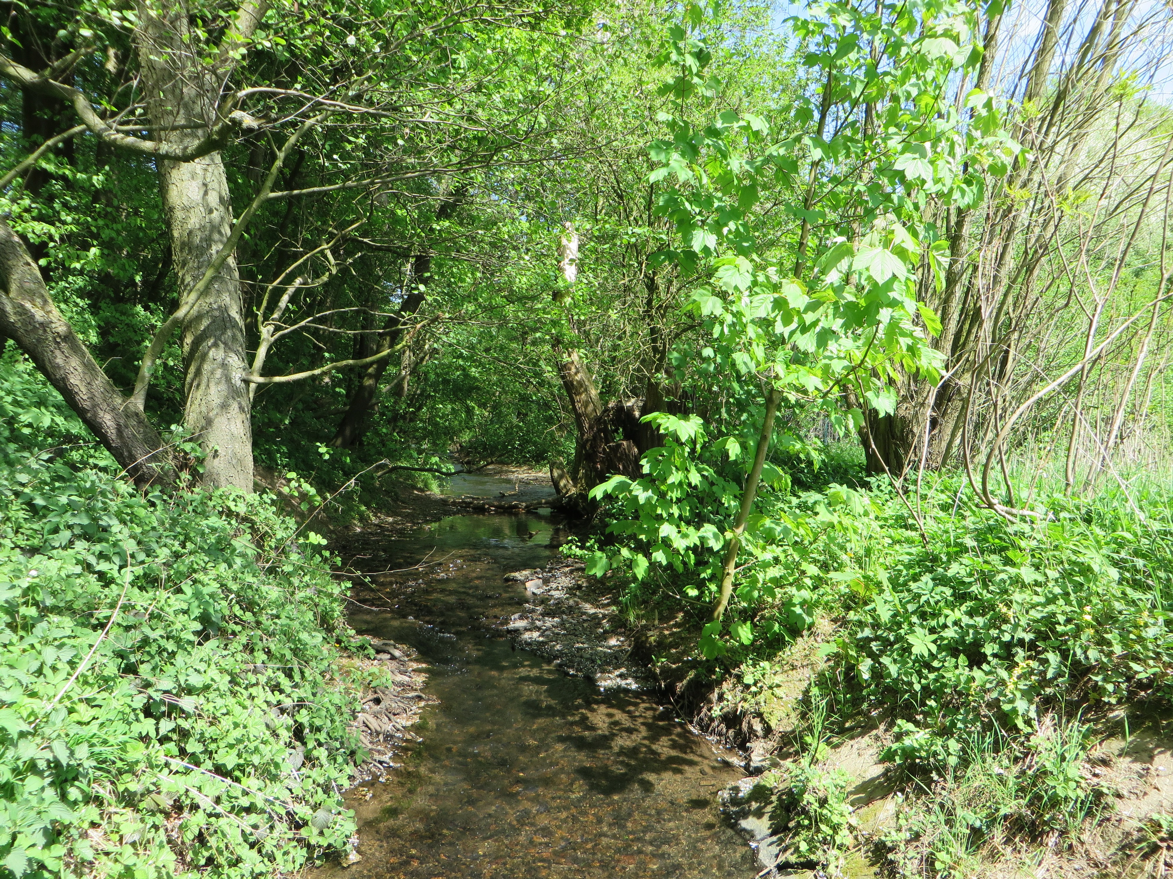 Naturschutzgebiet Unteres Wannebachtal (NSG HA-013) in Hagen-Hohenlimburg, Ortsteil Reh. Blick auf den Wannebach im Waldgebiet zwischen Wannebachstraße und Westheide. Das Schutzgebiet erstreckt sich östlich von Berchum und umfaßt den Talraum des Wannebaches mit Wiesen und Brachlandabschnitten, die z.T. sehr feucht sind, sowie zahlreichen Zuflüssen und Quellfluren. Der bis zu 3 Meter breite und z.T. tiefeingeschnittene Bachverlauf wird streckenweise durch einen mehrstämmigen Erlen-Weidensaum begleitet.